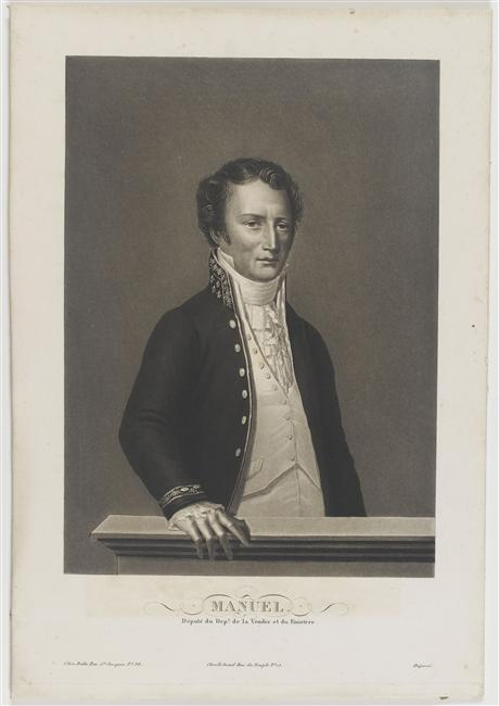 Auteur Anonyme français, H.: 0.269 et L.: 0.195, Musée Magnin, Dijon